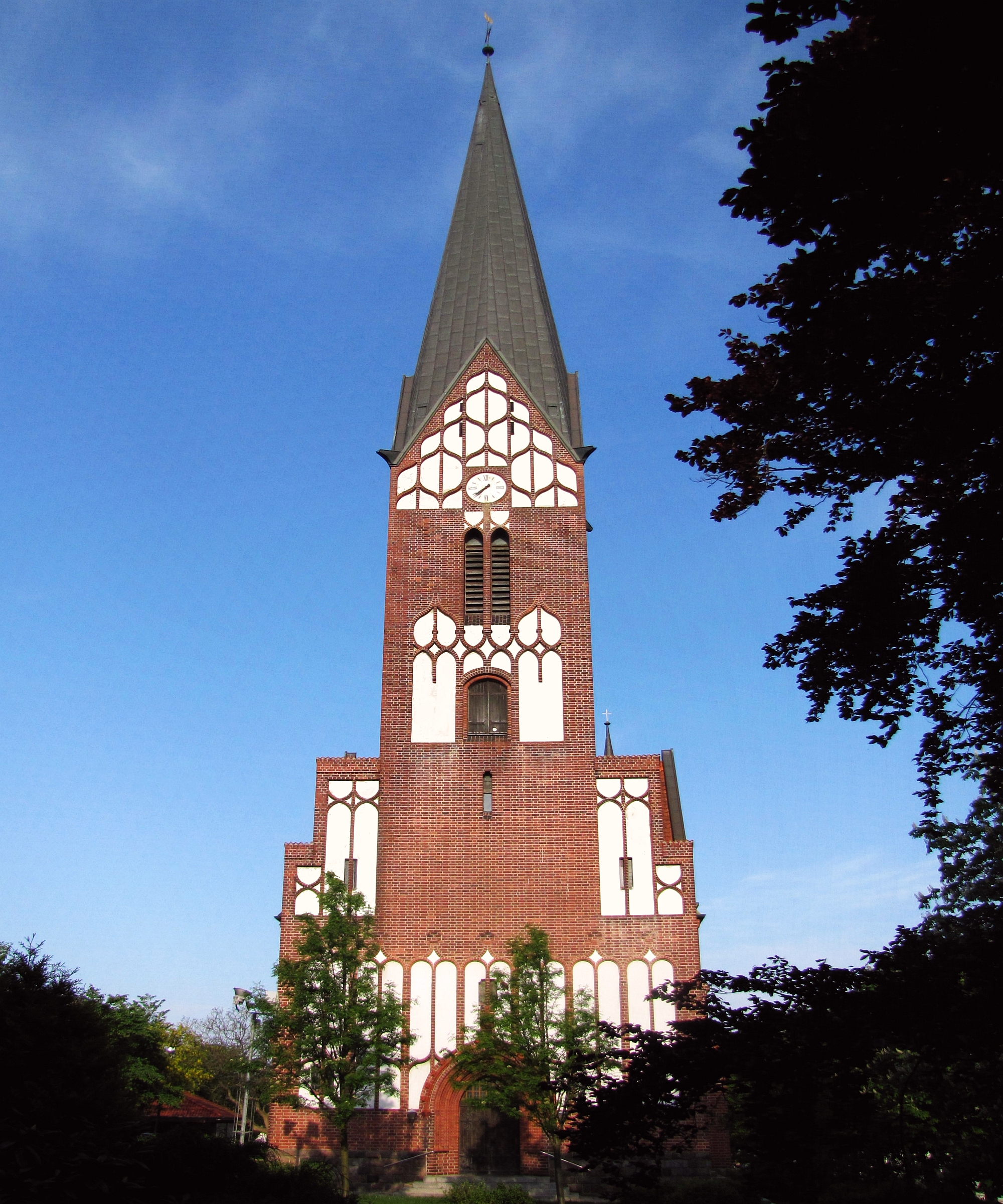 St. Jürgen-Kirche Backsteingotik aus 1907 Flensburg-Jürgensby Schleswig-Holstein Foto Wolfgang Pehlemann IMG_5884